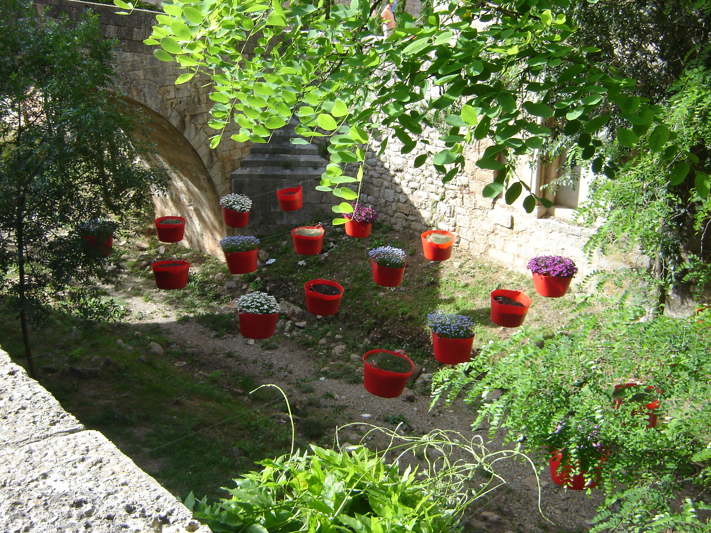 Riu Galligans durant el Temps de Flors